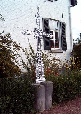 Limburgs: Waegkruus in Brómmele bie Gäöl